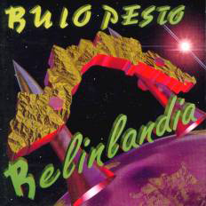 Copertina alternativa del cd del 1995 Belinlandia dei Buio Pesto.